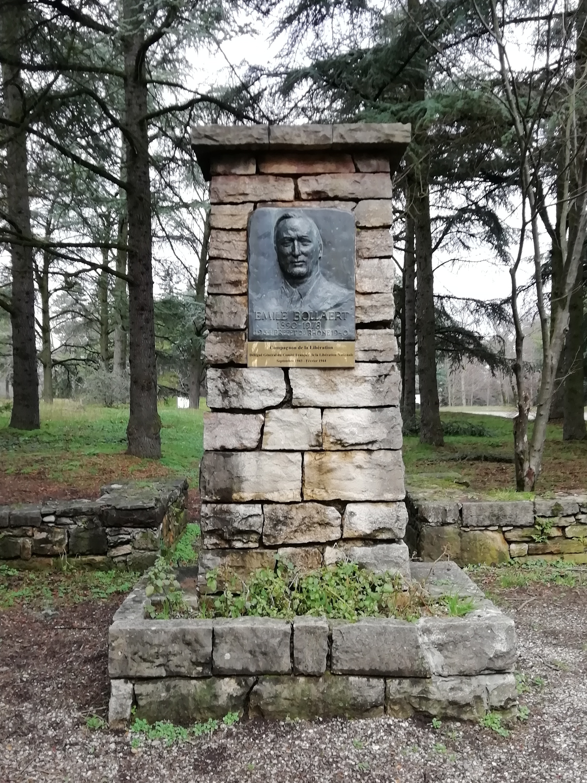 Émile Bollaert 1890-1978, préfet du Rhône 1934-1940, compagnon de la libération, plaque sur stèle